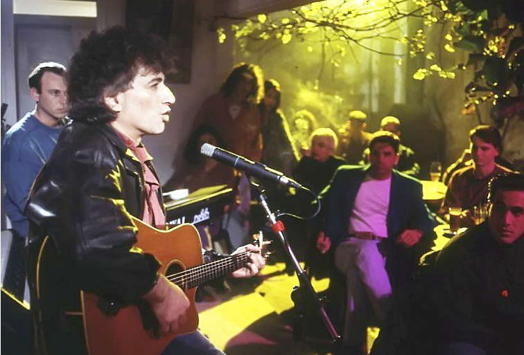 דני ליטני בסרט גולם במעגל